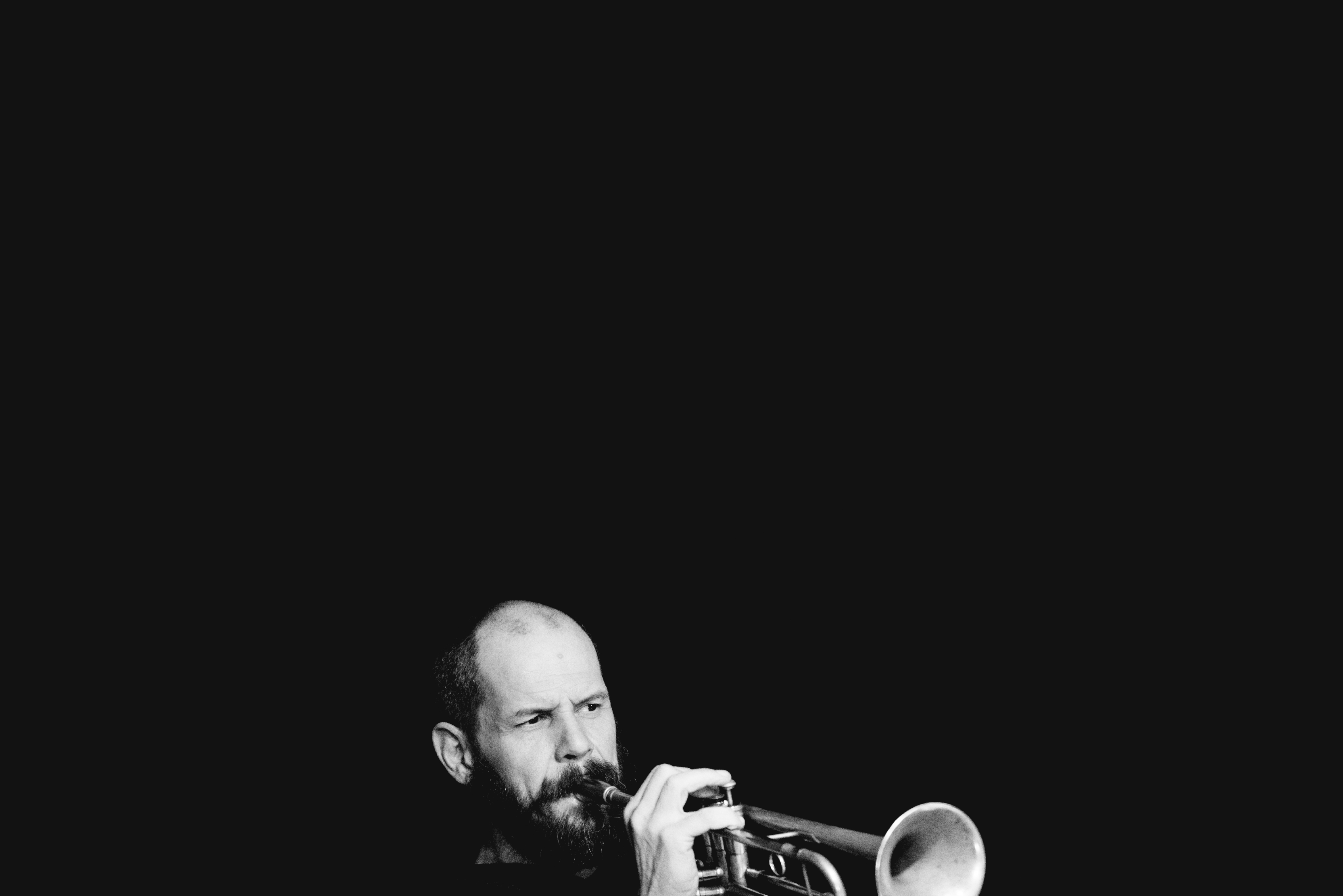 Bart in actie..